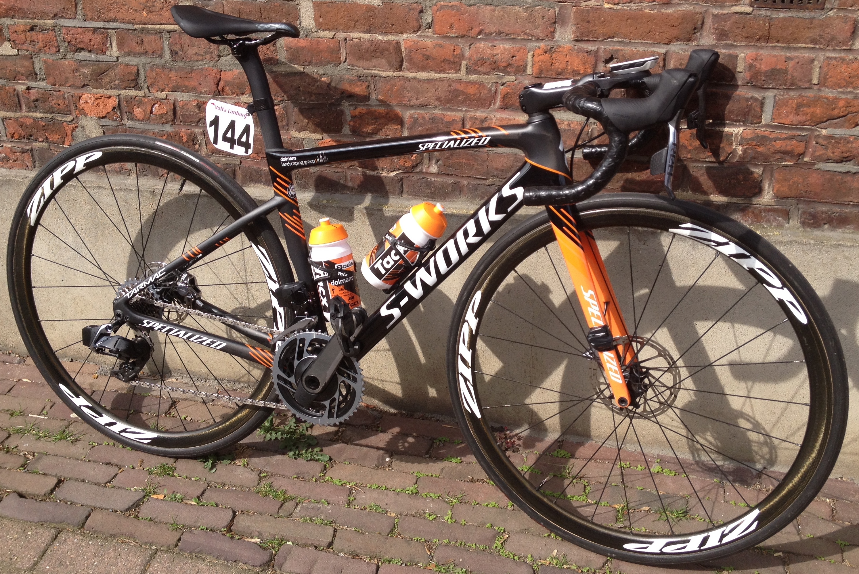 Volta Limburg Classic 2019 voor vrouwen met start en finish in Eijsden, Limburg, Nederland